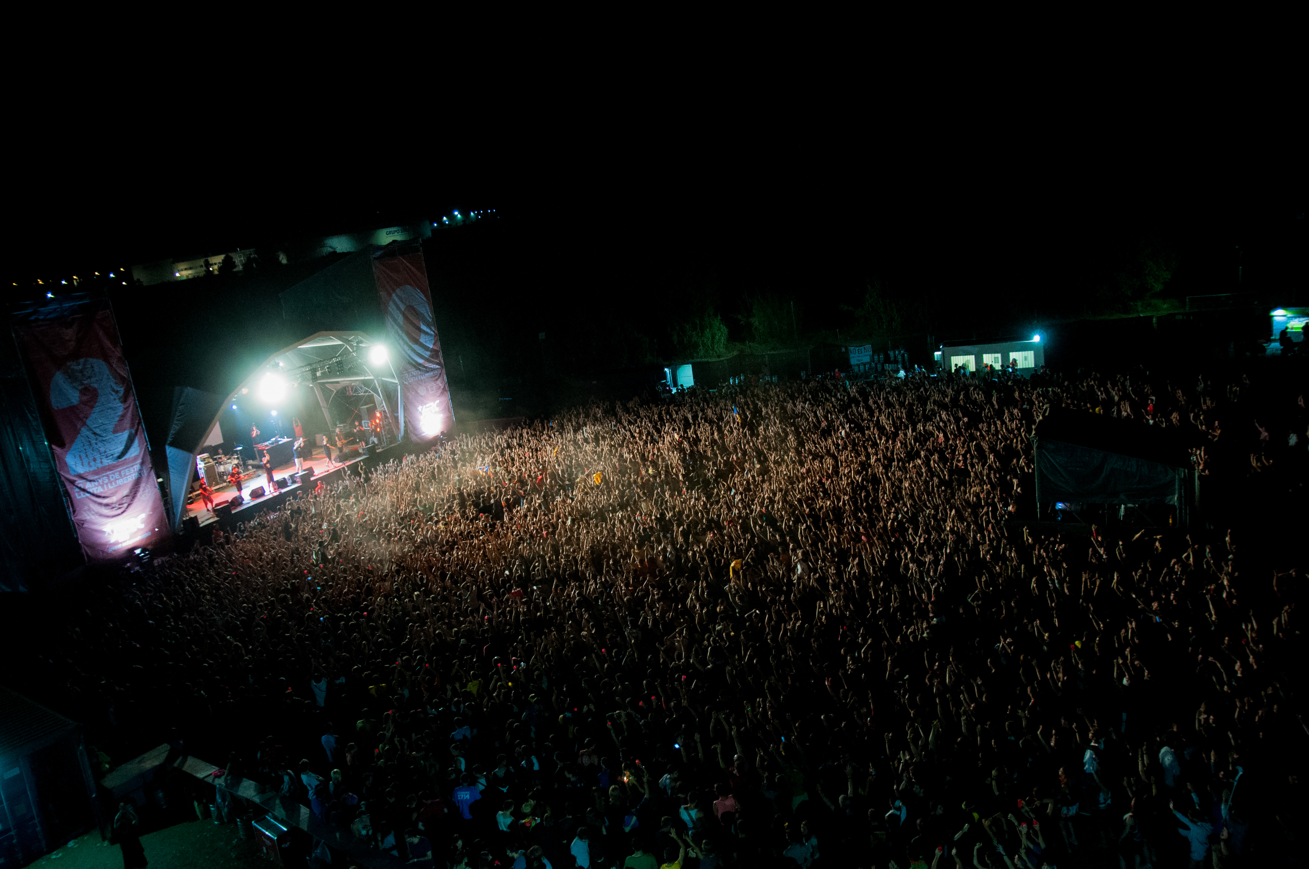 Imatge de l'Acampada Jove celebrada el juliol de 2014 a Montblanc.